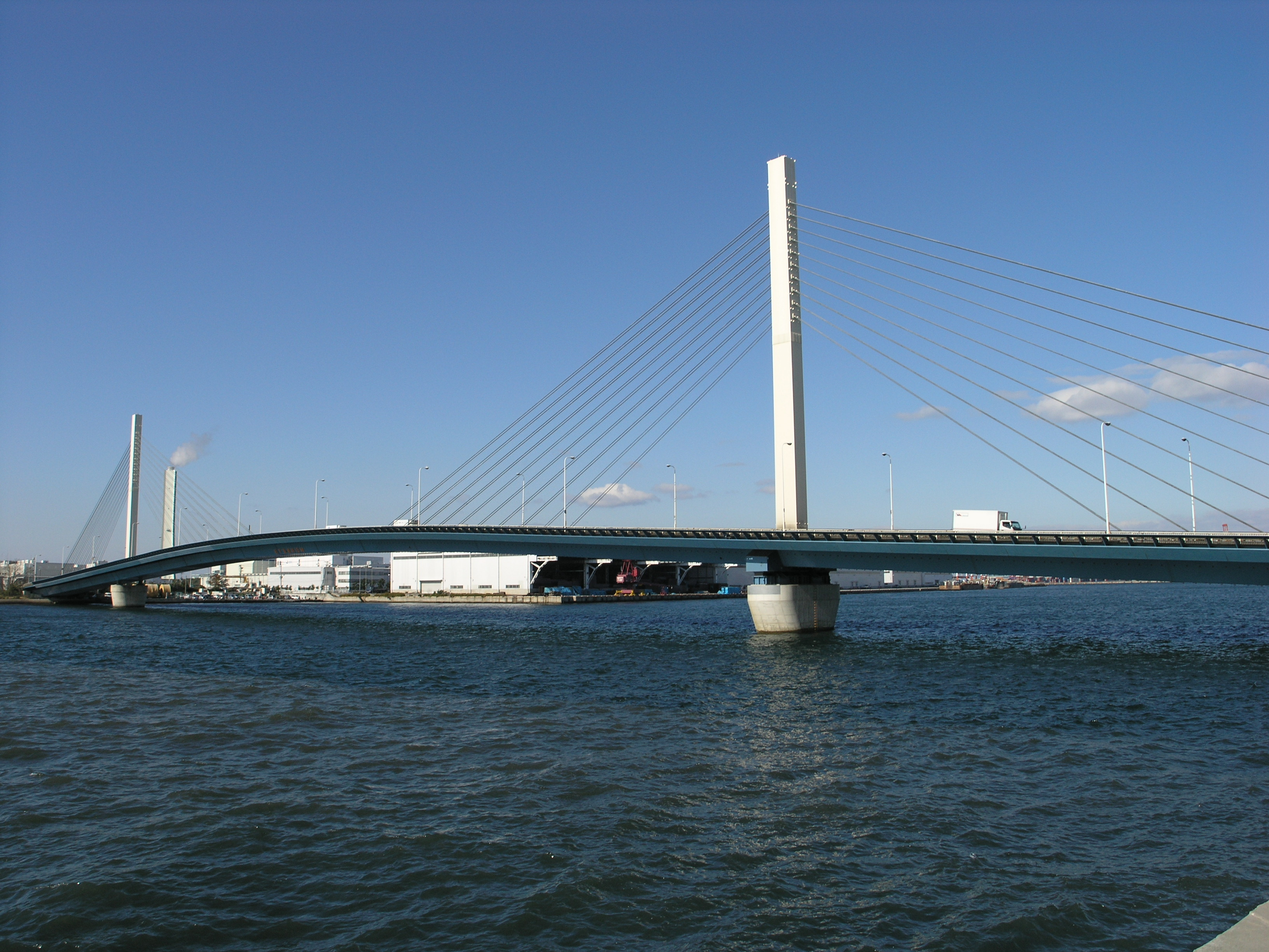 かもめ大橋（大阪市住之江区） 2008年11月撮影。 機材：C8080WZ 撮影者：Kansai explorer